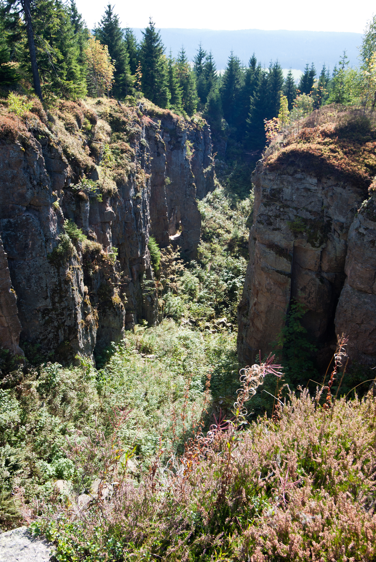 Horní Blatná, Krušné hory, Vlčí jámy; více